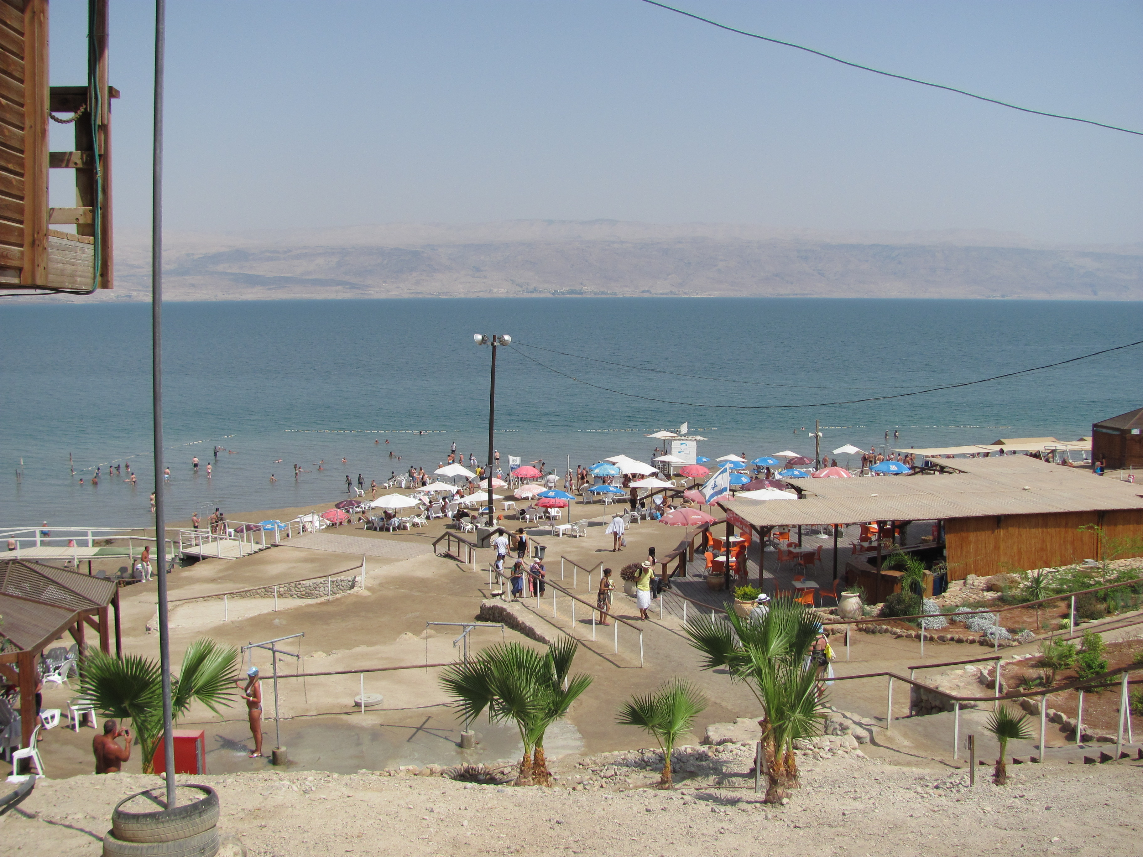 Vista de las playas del Mar Muerto sobre el lado Israelí. Al fondo se ven las montañas de territorio Jordano.